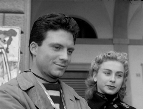 Screenshot del film I vitelloni (1953)